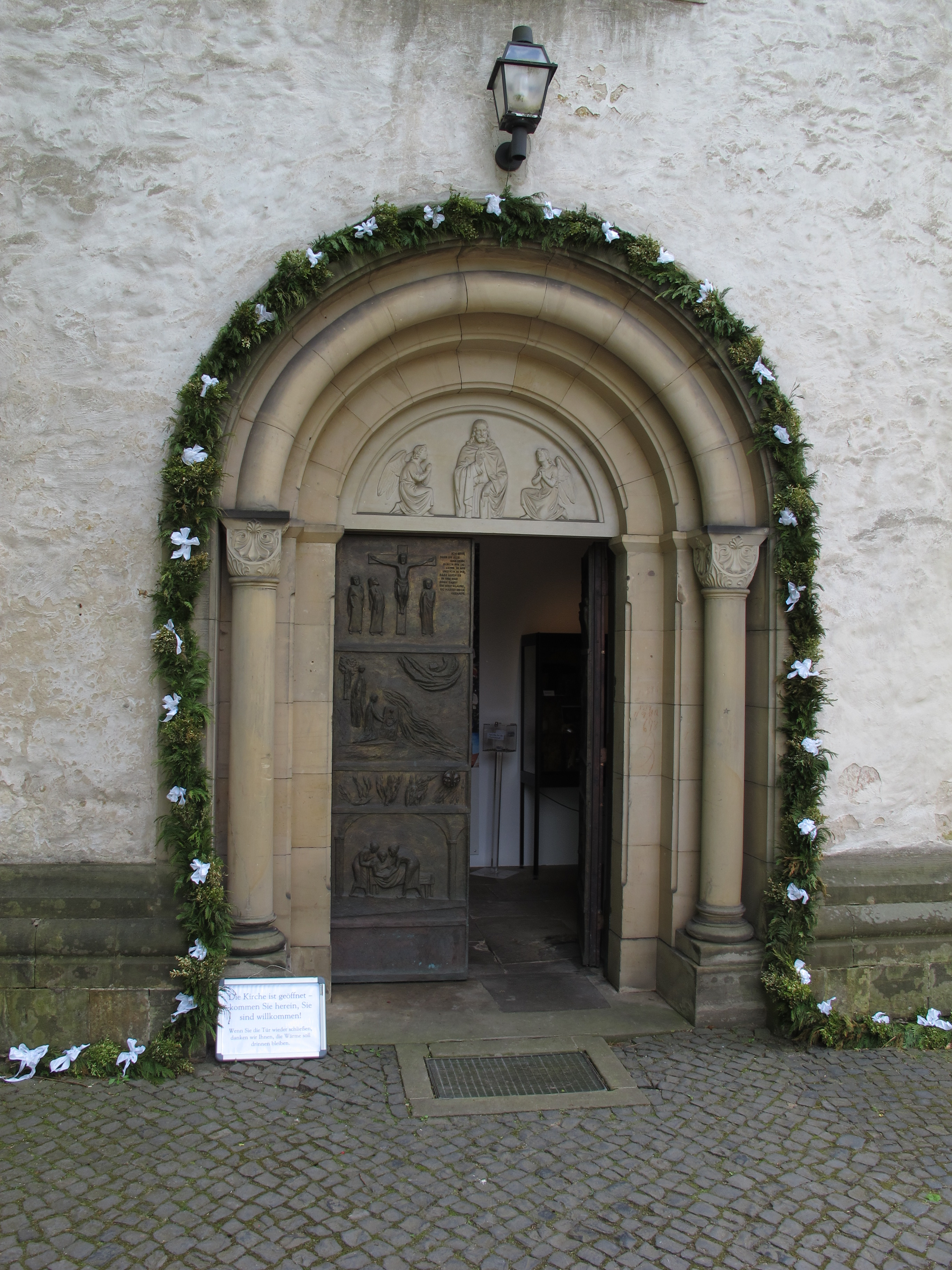 Klosterkirche in Hannover-Marienwerder: Hauptportal (Nordseite) mit Bronzetüren